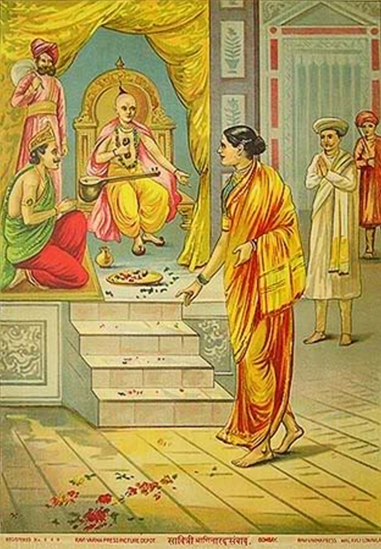 Savitri Narad Samvad